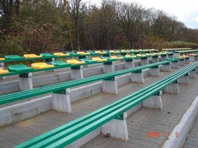 Stadion w Redle